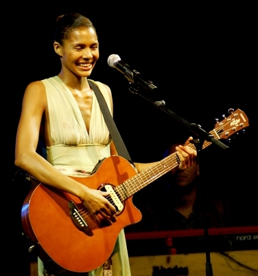 Ayo en Concert au Sporting Monte Carlo - Monaco le 30 Aout 2007 (cropped version)